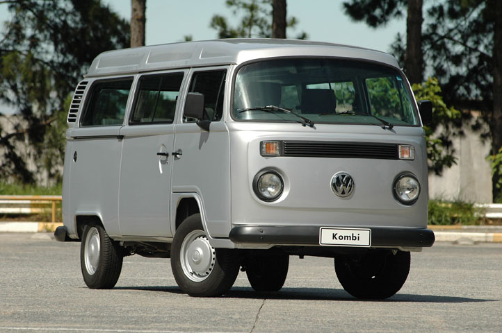 VW-Bus T2c brasilianischer Herstellung